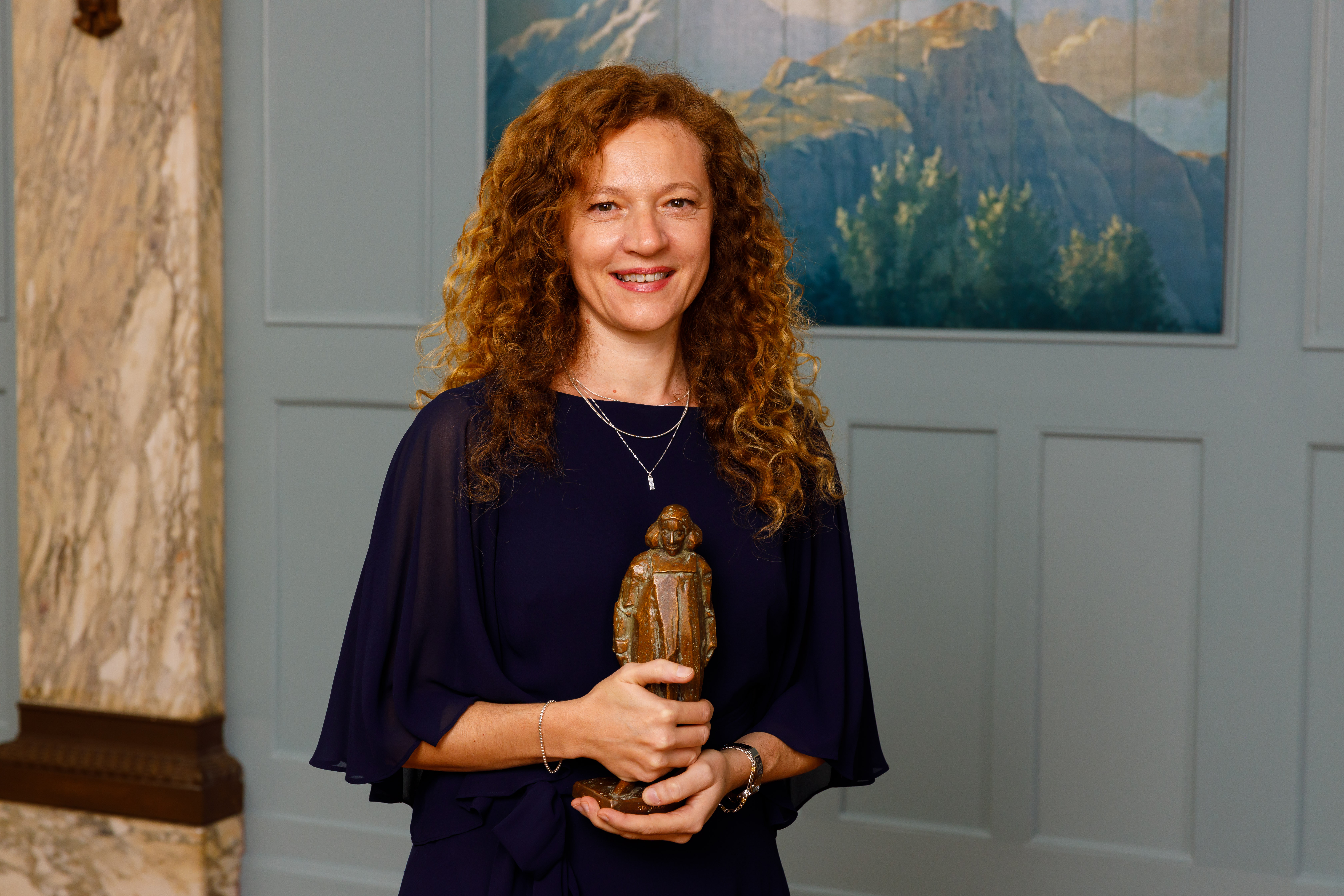 Amina Helmi. Foto: Bram Saeys; NWO. Spinoza- en Stevinpremie, uitreiking 2019